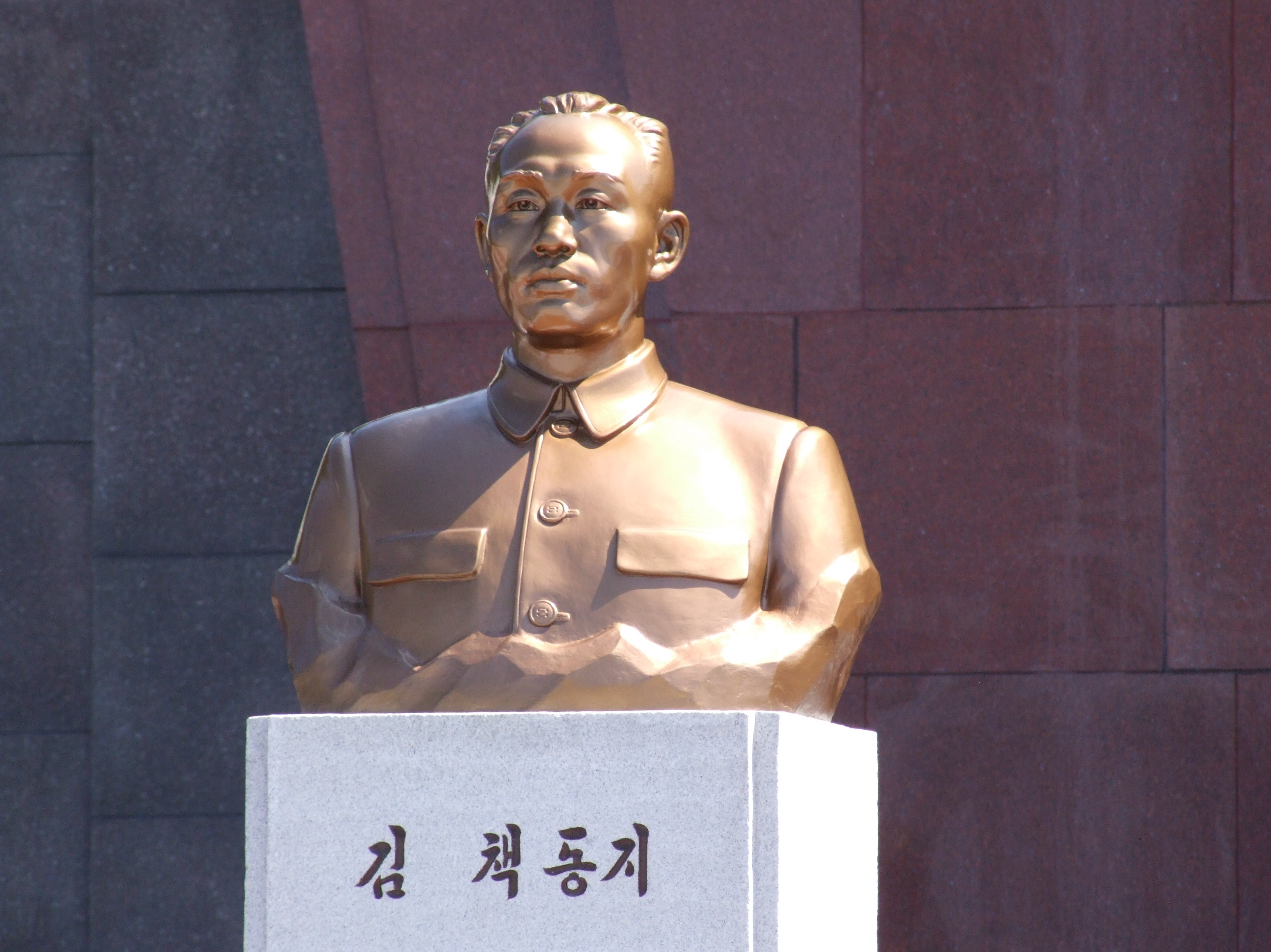 Friedhof der Revolutionshelden in Pjöngjang